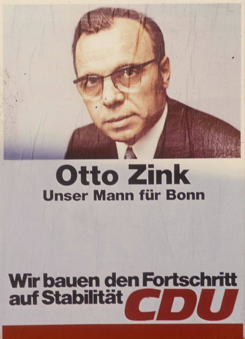 Otto Zink Unser Mann für Bonn SloganAbbildung:PorträtfotoKommentar:Außenaufnahme (Plakatständer)Plakatart:Kandidaten-/Personenplakat mit PorträtObjekt-Signatur:10-001: 1546Bestand:Plakate zu Bundestagswahlen (10-001)GliederungBestand10-18:Plakate zu Bundestagswahlen (10-001) » Die 7. Bundestagswahl am 19. November 1972 » CDU » Mit PorträtfotoLizenz:KAS/ACDP 10-001: 1546 CC-BY-SA 3.0 DE